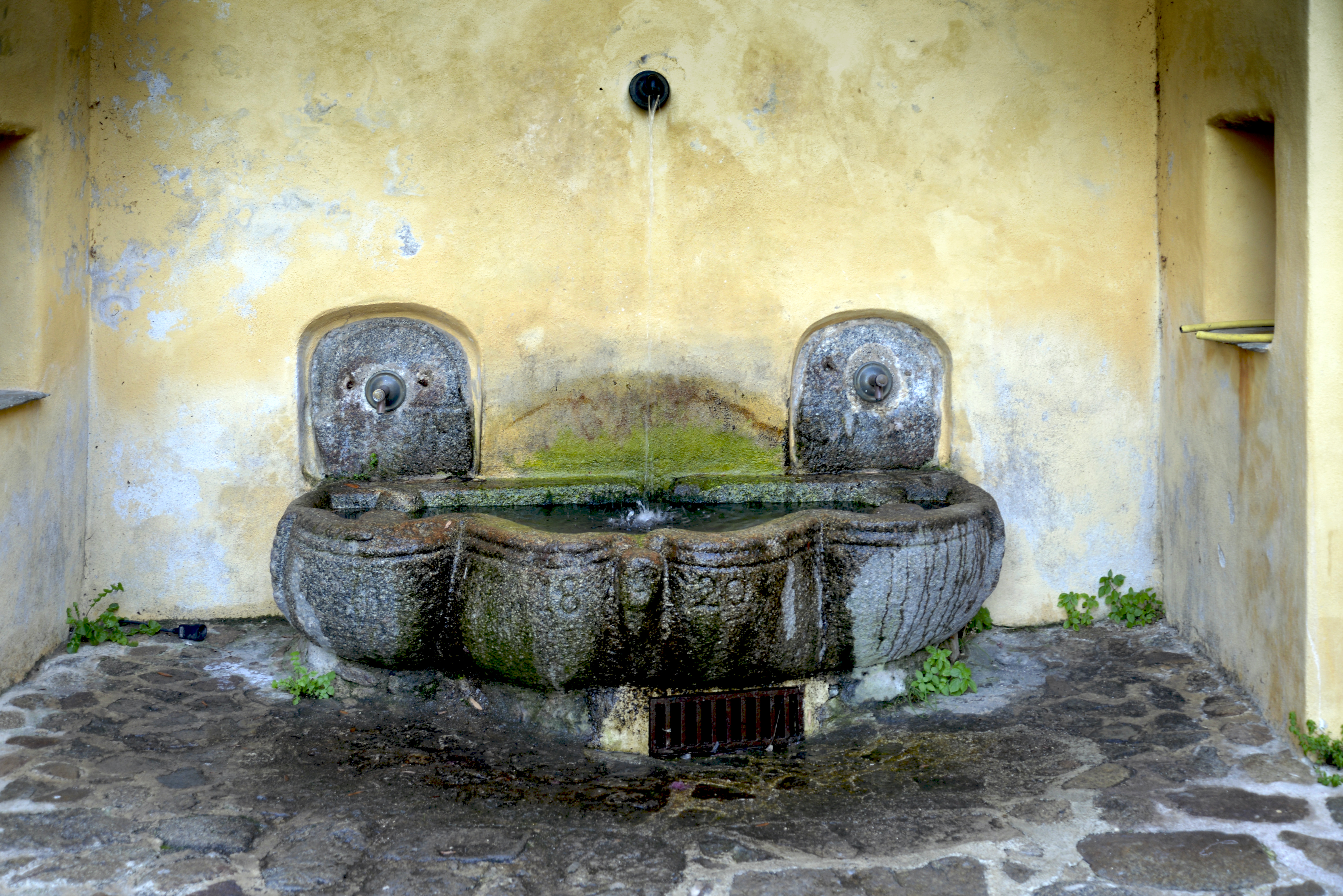 Lavatoggio, Balagne (Haute-Corse) - Funtana di u Turiolu, datée de 1820. en haut de la place de la Tour (piazza di a torra).